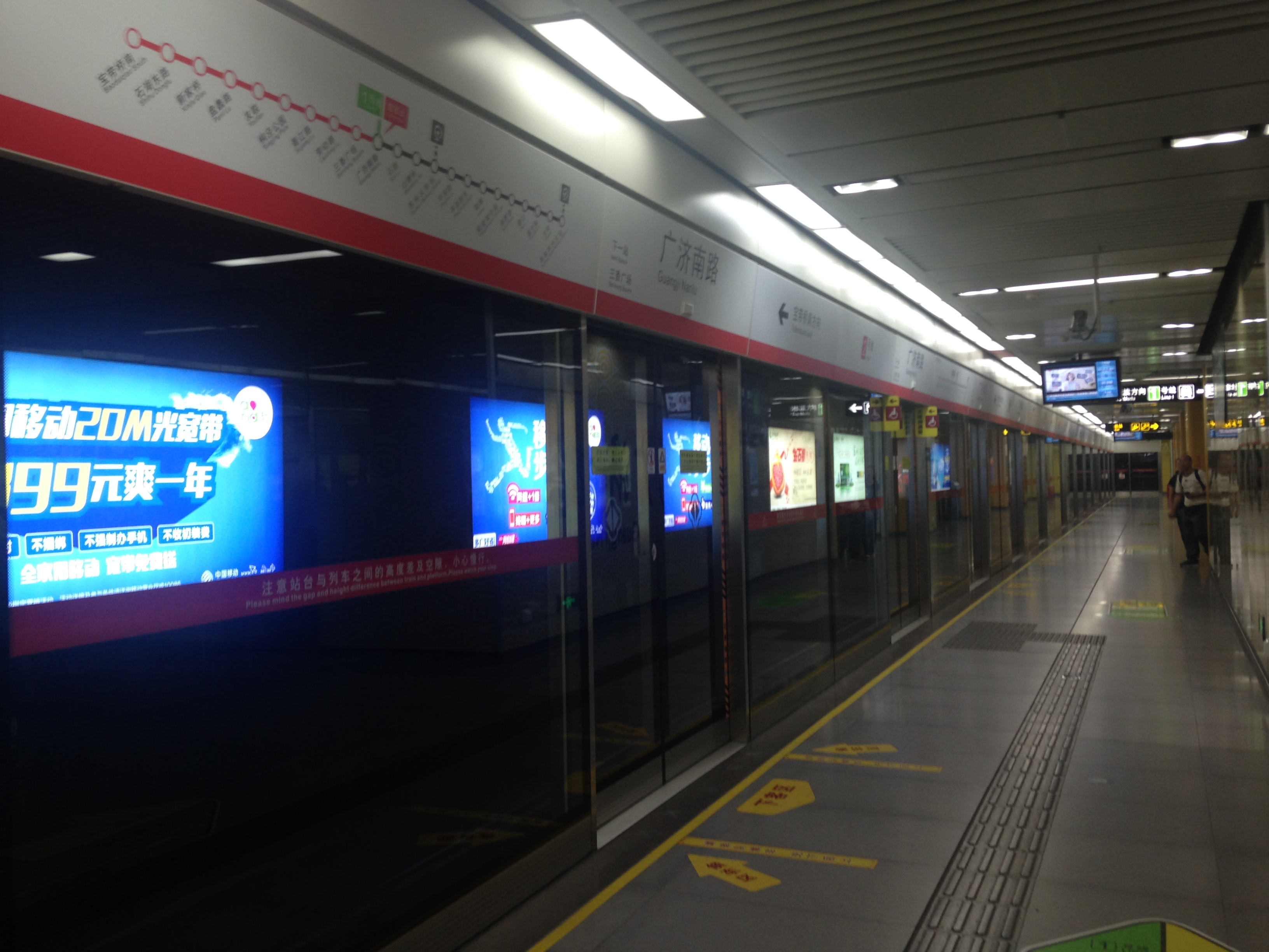 広済南路駅(蘇州軌道交通2号線)のホーム